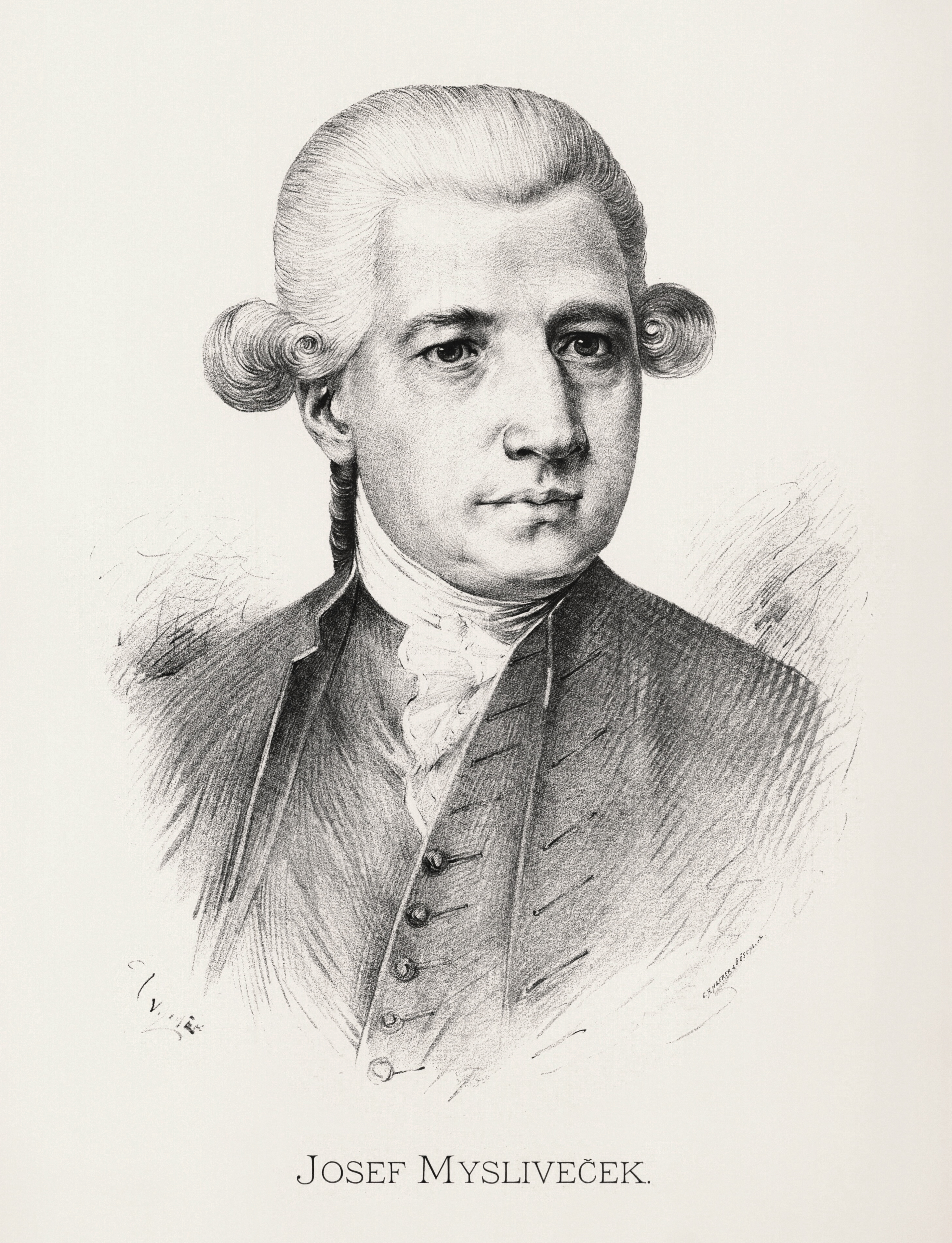 Portréty předních osobností od Jana Vilímka